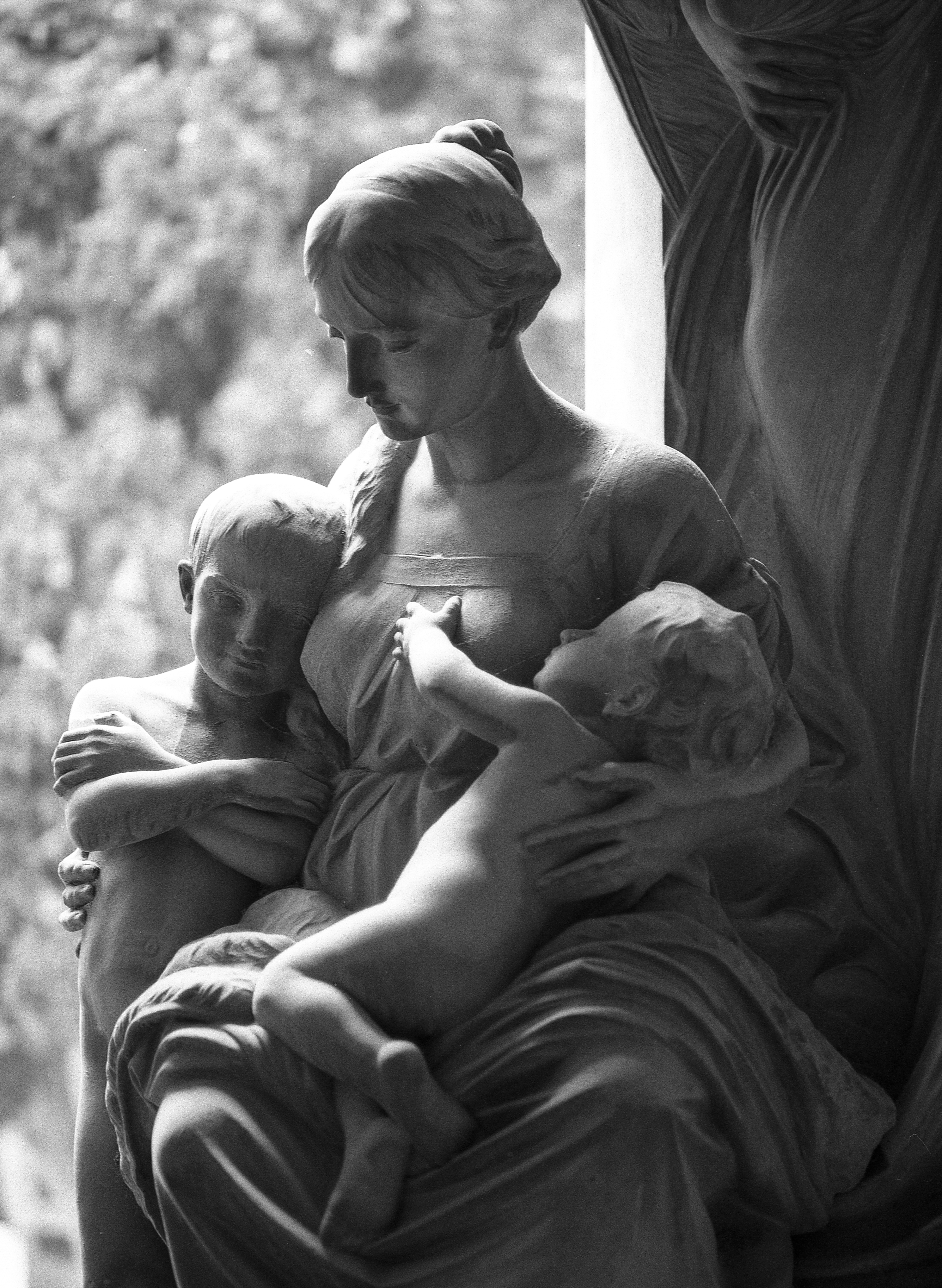 Cimitero di Staglieno This is a photo of a monument which is part of cultural heritage of Italy.